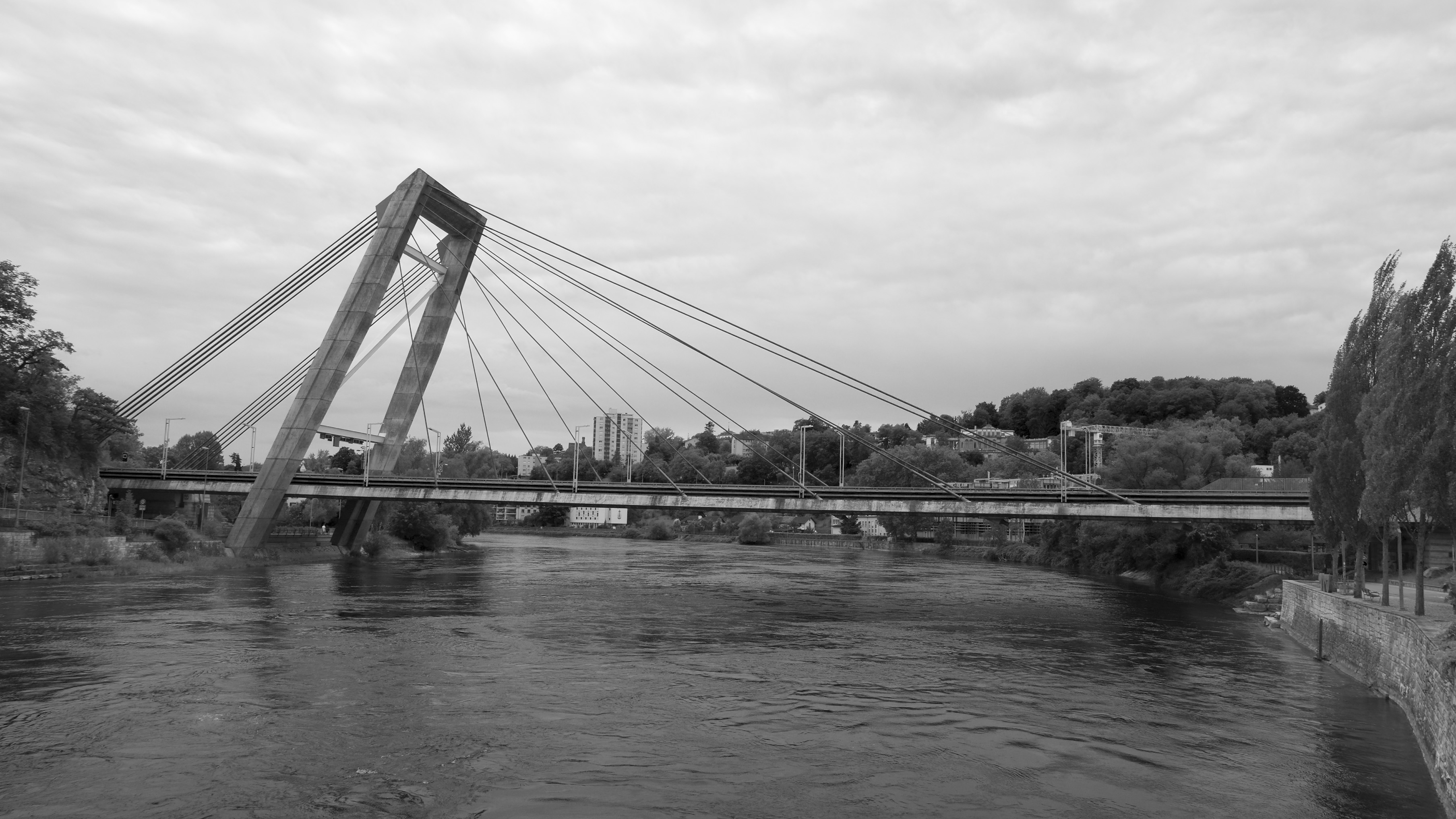 A4-Rheinbrücke bei Schaffhausen